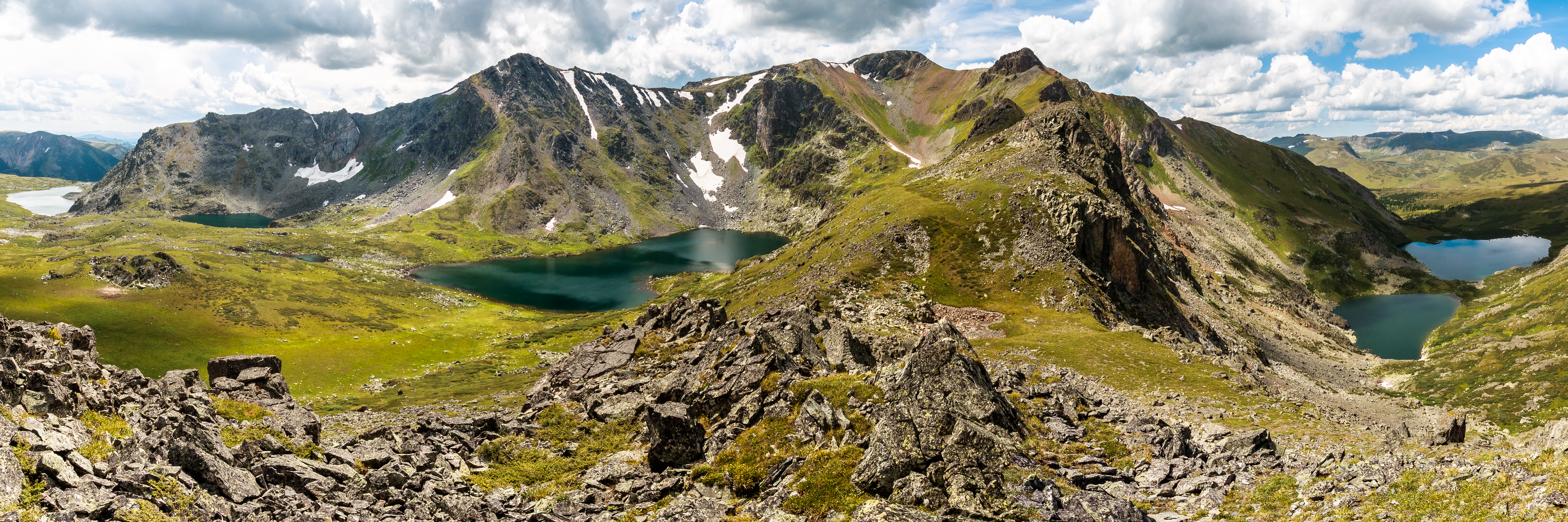 Вид на массив и вершину с восточной стороны.